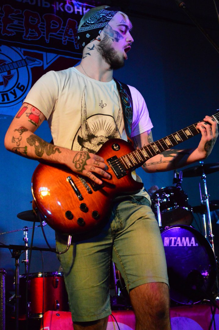 Участники фестиваля разных лет.